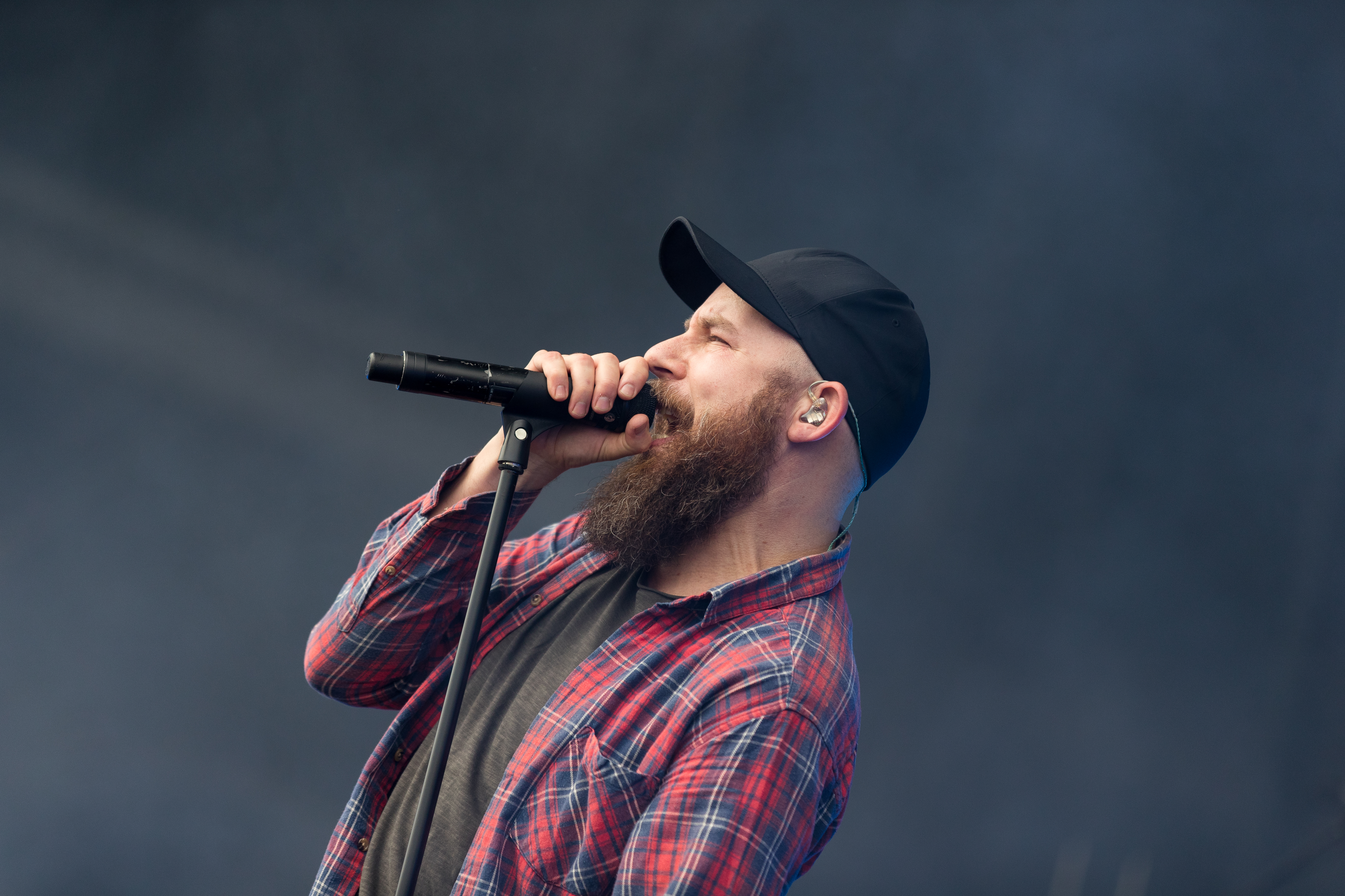 In Flames during Rock am Ring at Nürburgring, Nürnburg, Rheinland Pfalz, Germany on 2017-06-02, Photo: Sven Mandel